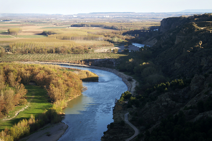 El río Aragón visto desde lo alto del barranco de Peñalén, donde fue asesinado por su hermano Ramón en el año 1076 el rey de Pamplona Sancho Garcés IV.